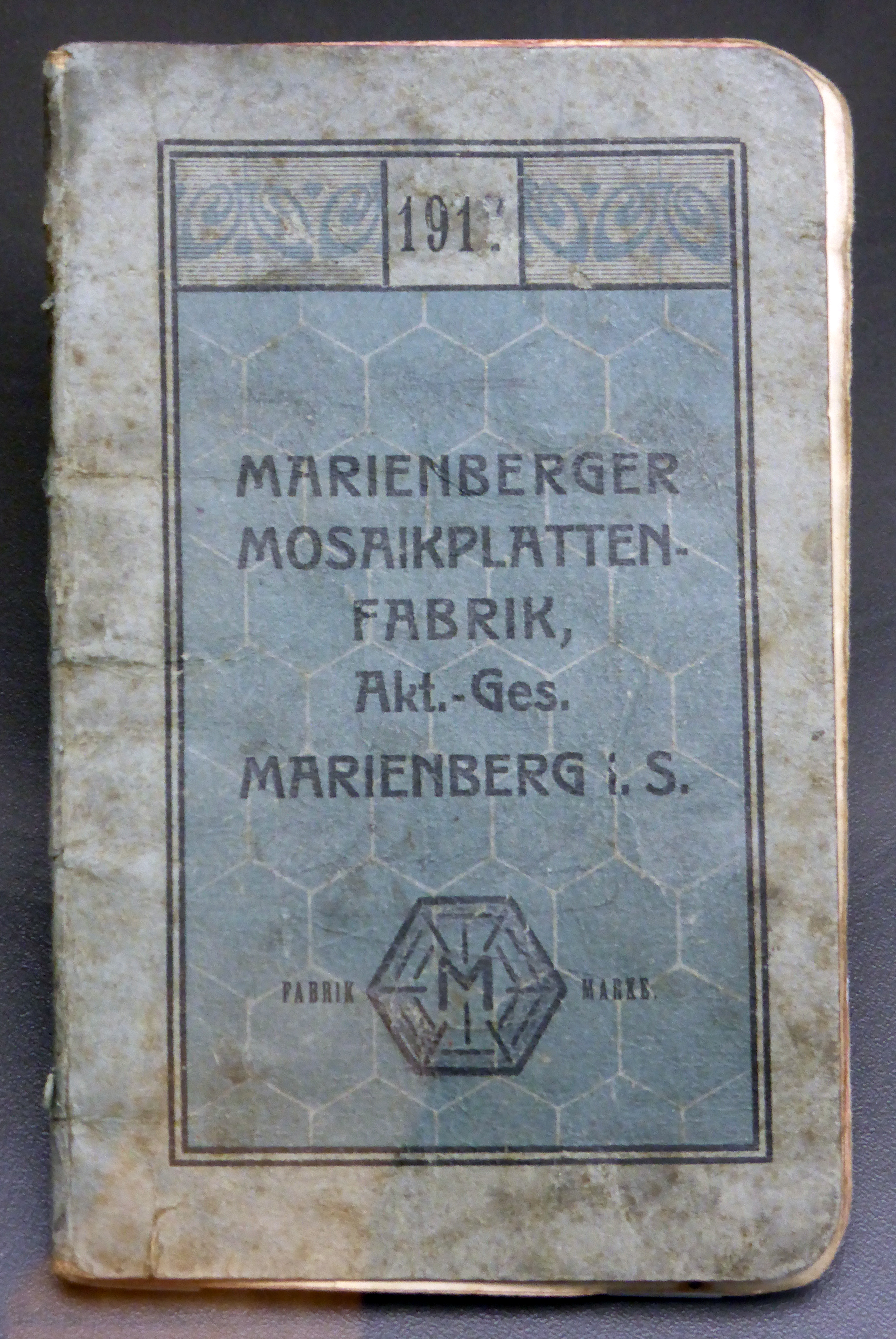 Taschenkalender der Marienberger Mosaikplattenfabrik Aktiengesellschaft von 1912. Ausgestellt im Museum sächsisch-böhmisches Erzgebirge in Marienberg.